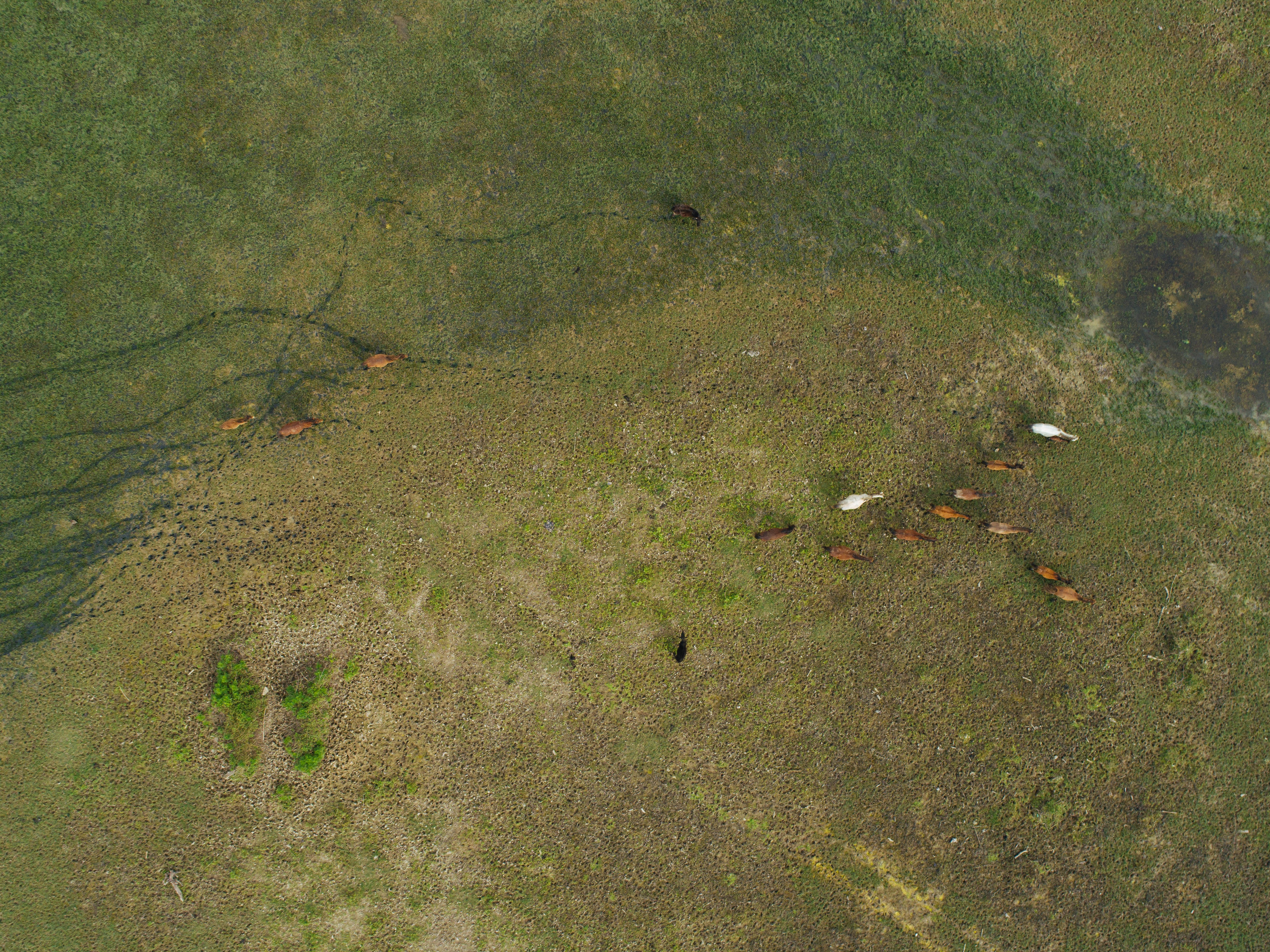 ماسال شهری در استان گیلان ایران که در کنار کوه‌های تالش واقع شده‌است. معنی کلمه ماسال کوه وار یا کنار کوه یا دارای کوه است که از کلماتی مانند مسال,مازال و ... گرفته شده است فاصلهٔ ماسال از شهر تالش ۶۰ کیلومتر است و با رشت از راه صومعه‌سرا ۵۵ کیلومتر فاصله دارد. تصویر از ارتفاعات با کمک جناب فرید کامرانیا از ماسال تهیه شده است